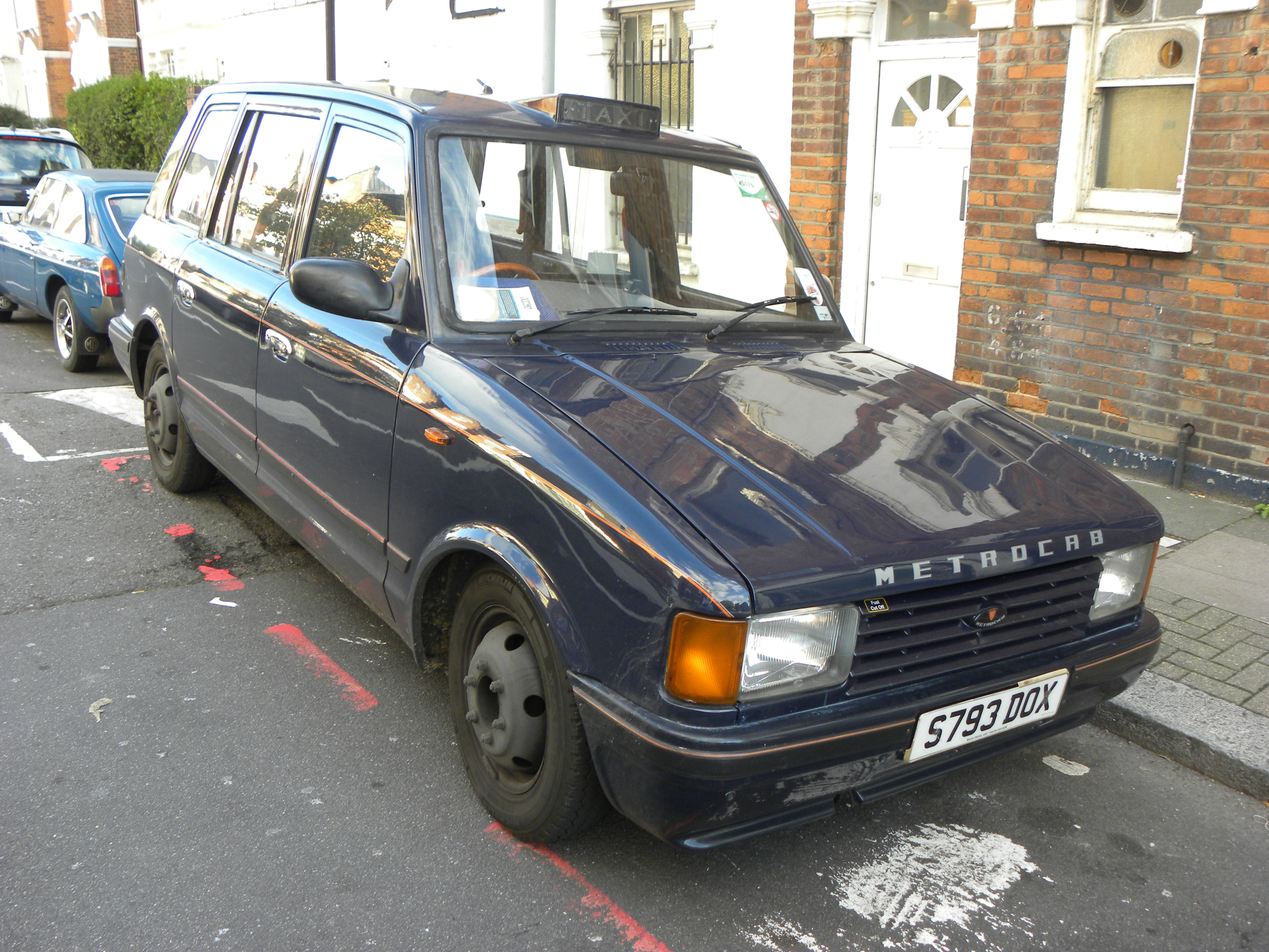 MCW Metrocab II